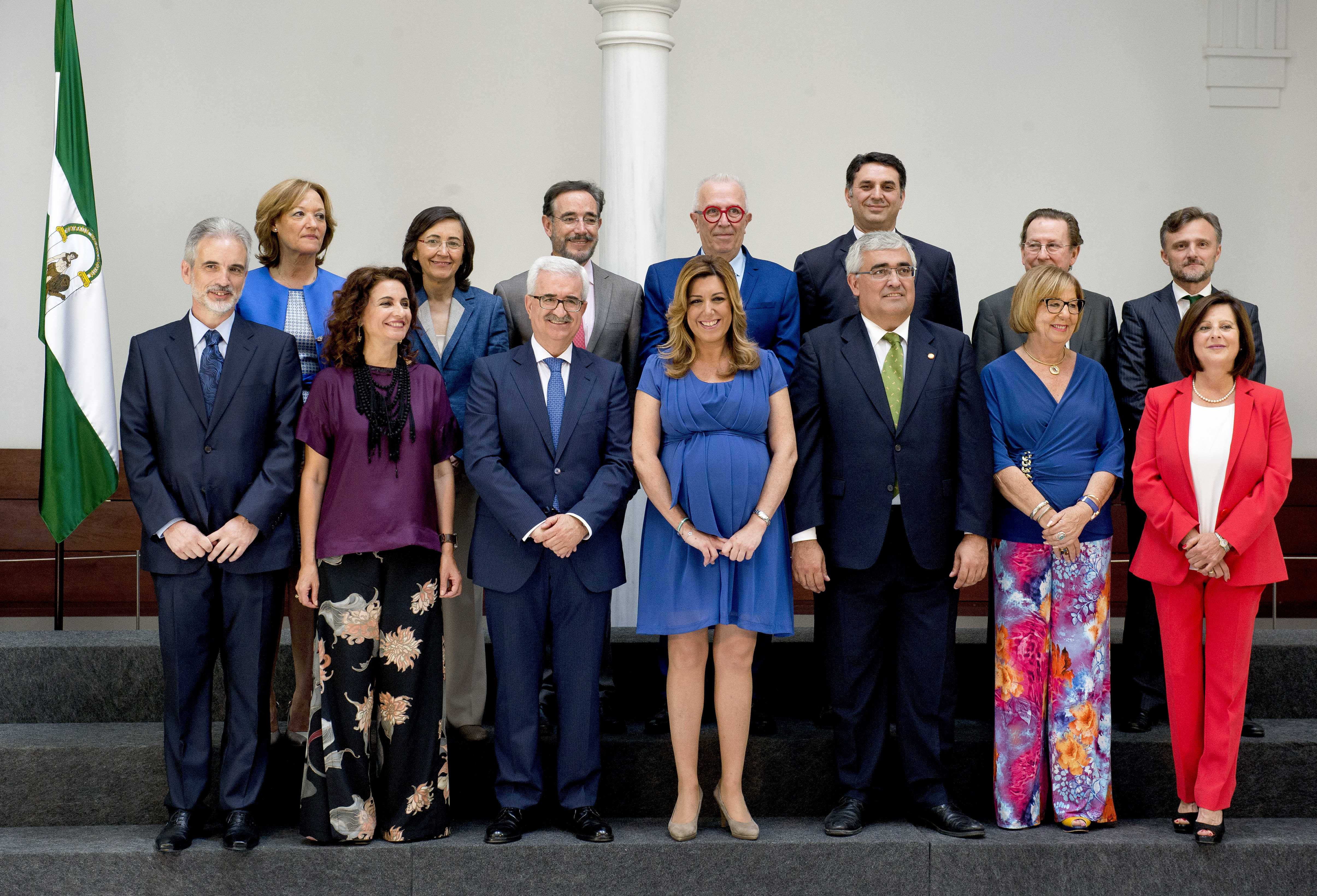 Foto del segundo gobierno de Susana Díaz.